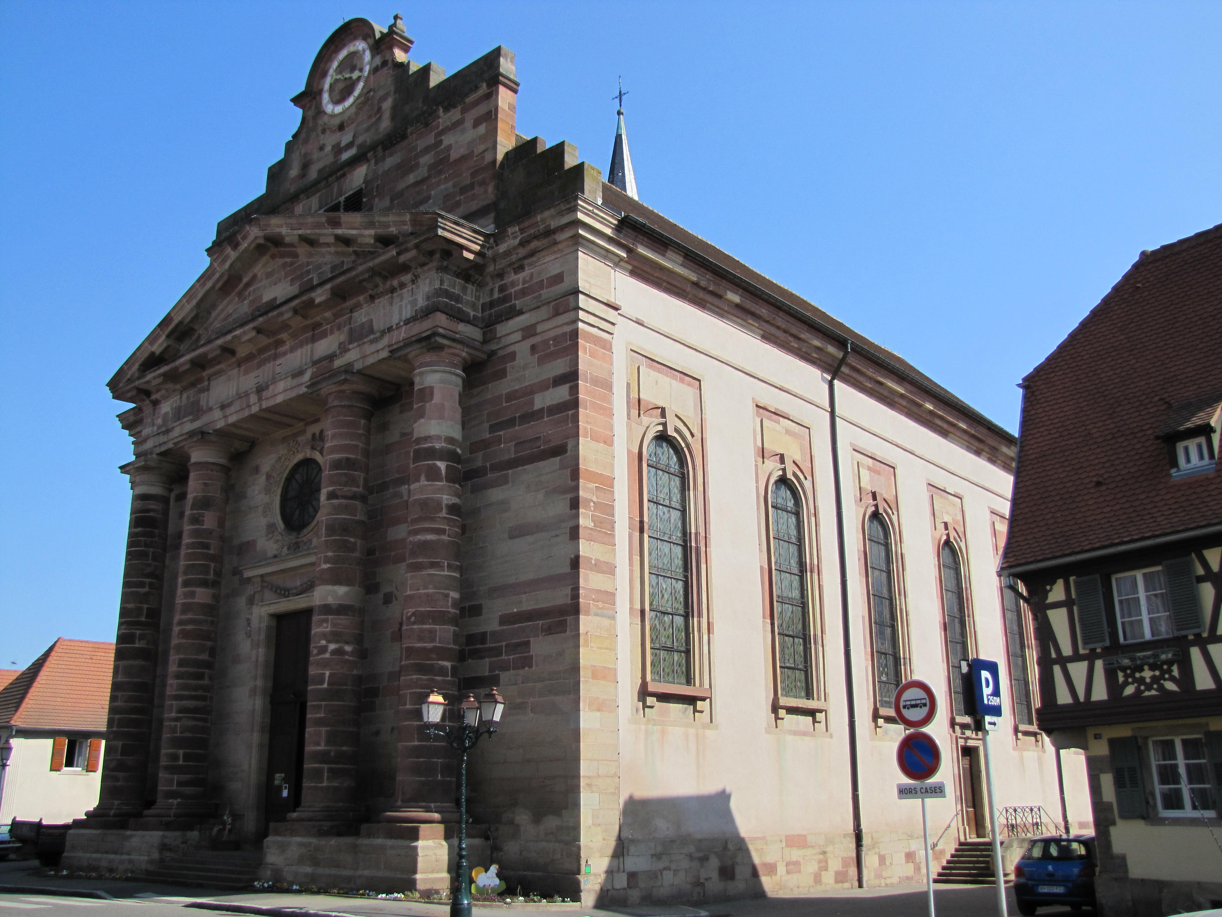 Alsace, Bas-Rhin, Rosheim, Église Saint-Étienne dite "Oberkirche" (XIIIe-XVIIIe) (PA00084908, IA00075639).